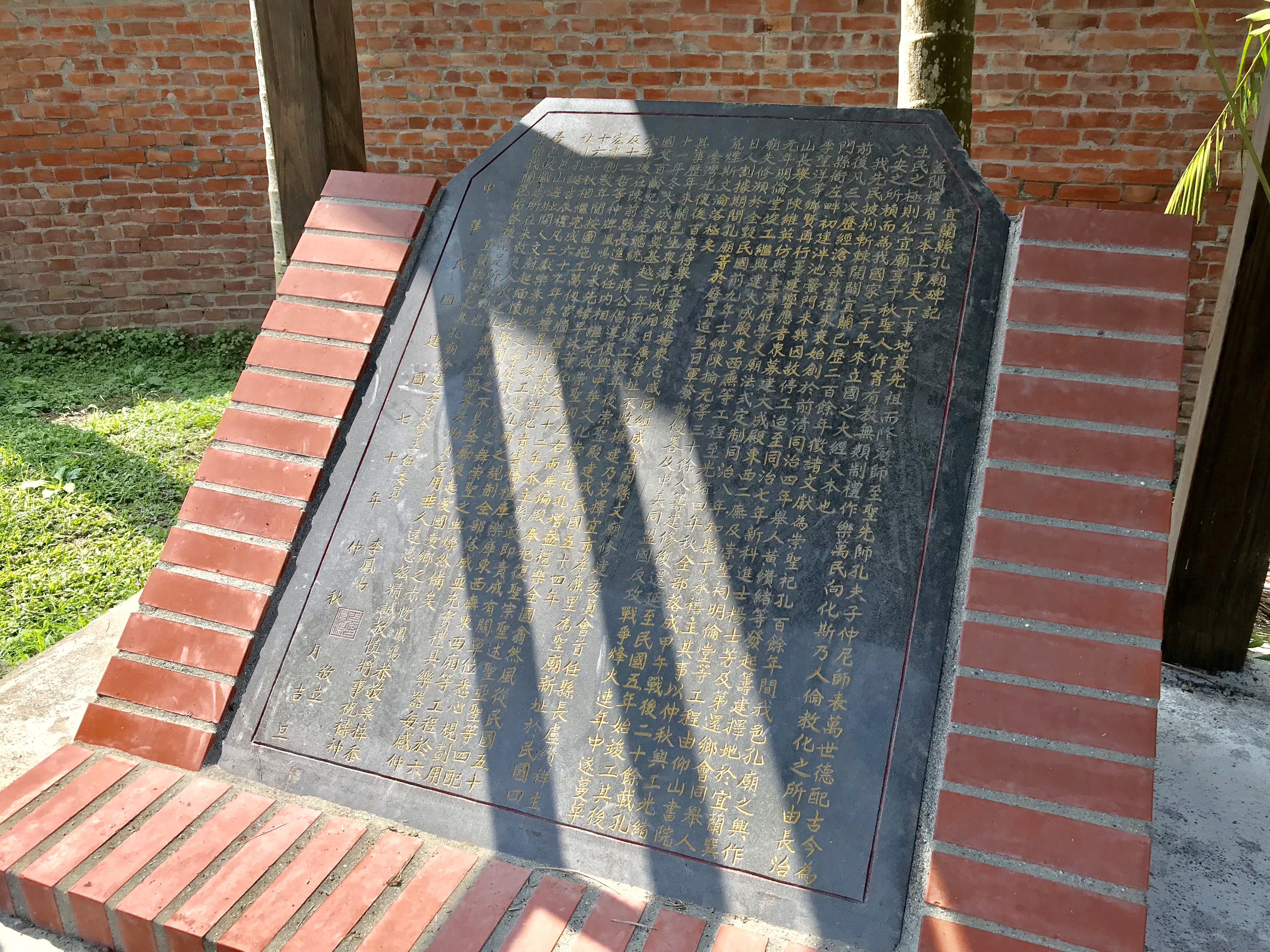 中文（台灣）: 宜蘭縣孔廟碑記